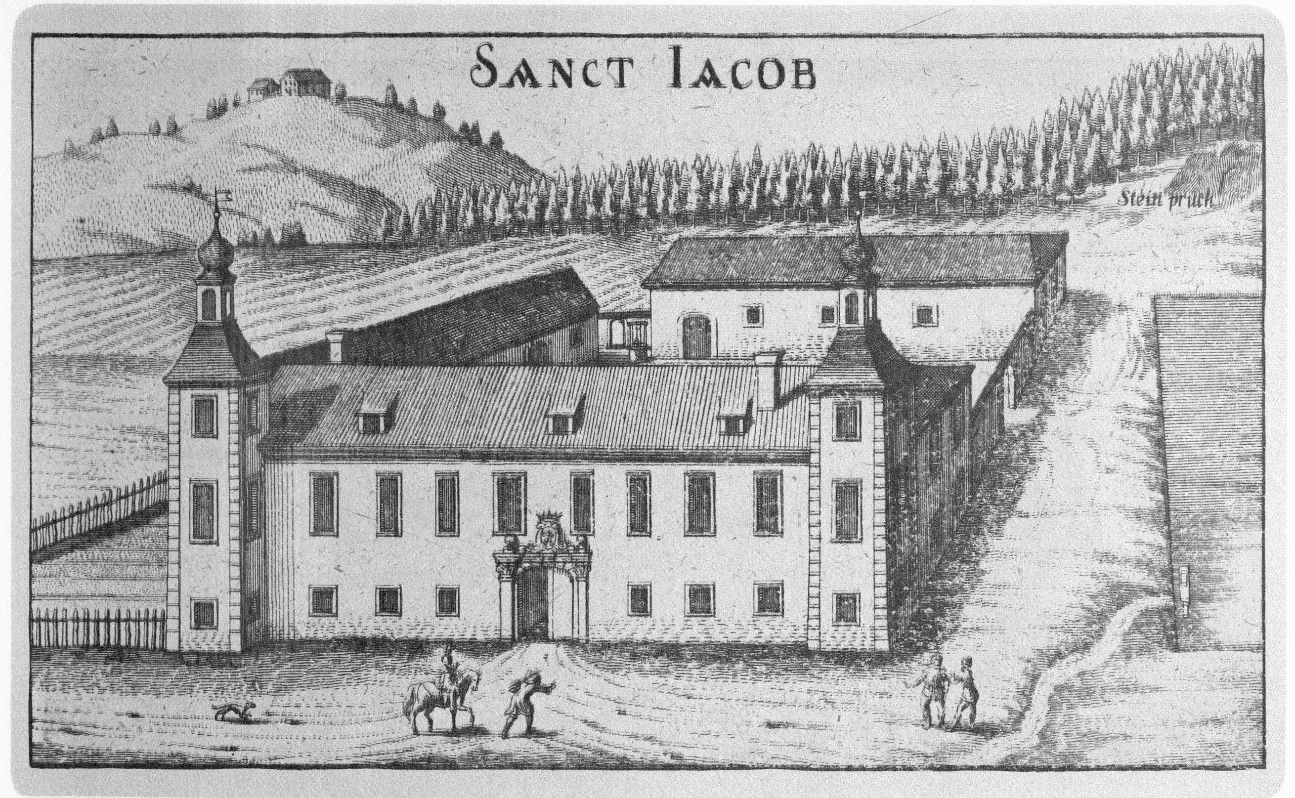 G. M. Vischers Käyserlichen Geographi, Topographia Ducatus Stiriae, Das ist: Eigentliche Delineation / und Abbildung aller Städte / Schlösser / Marcktfleck / Lustgärten / Probsteyen / Stiffter / Clöster und Kirchen / so es sich im Herzogthumb Steyrmarck befinden; Und anjetzo Umb einen billichen Preyß zu finden seynd Bey Johann Bitsch Universitäts Buchhandlern / Auff dem Juden=Platz bey der guldenen Saulen. Graz 1681 Die Nummerierung der Dateien folgt der alphabetischen Reihung der Ortsnamen und entspricht nicht dem Vischer-Register